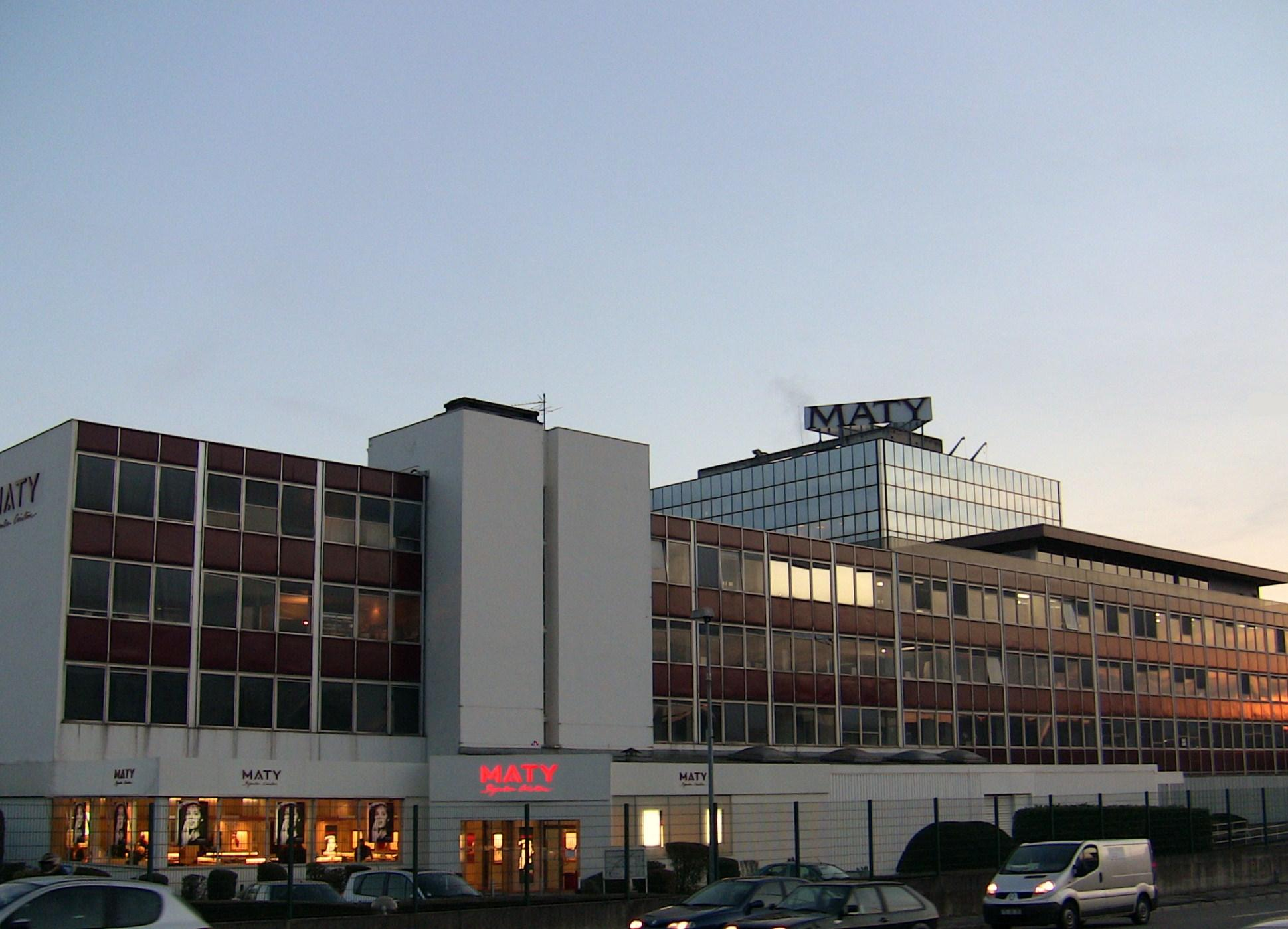 L'entreprise Maty, à Besançon (Doubs, France).